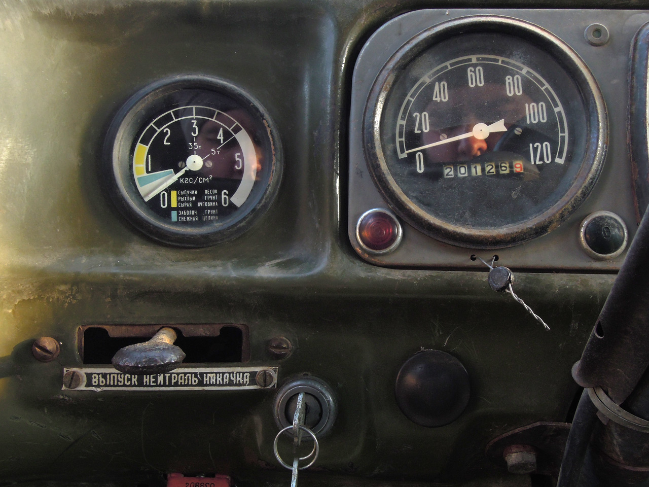 Колёсные манометр и кран, спидометр и замок зажигания грузовика-вездехода ЗИЛ-131